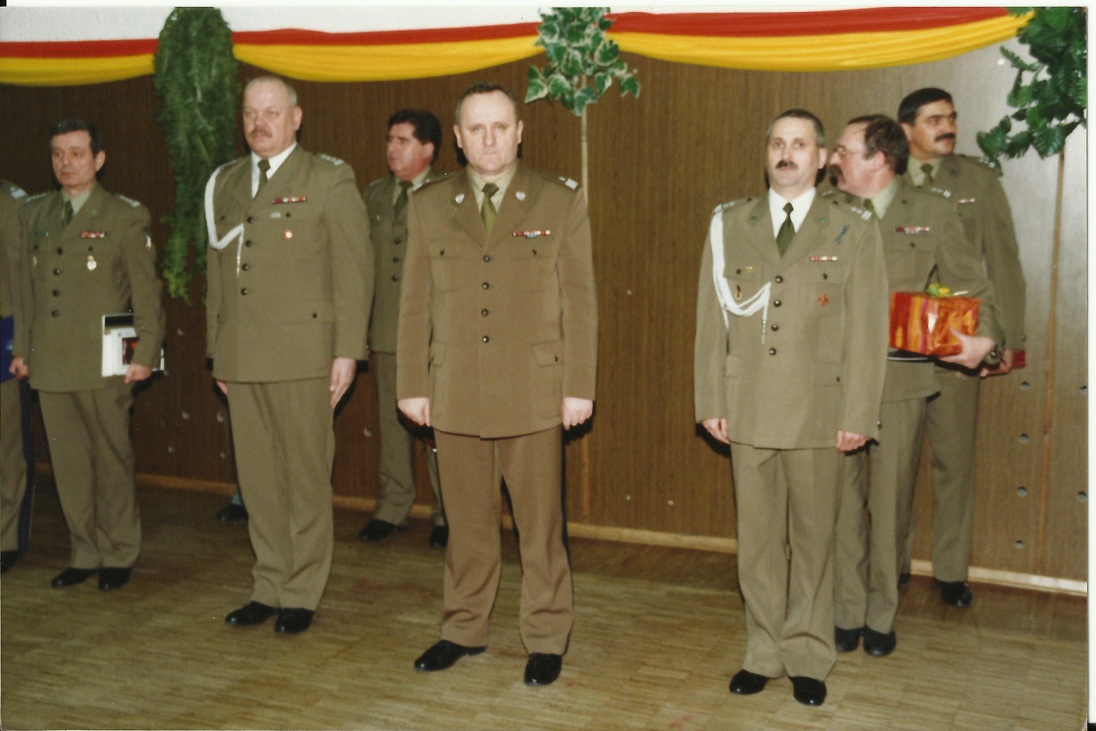 Przekazanie obowiązków komendanta Oddziału Żandarmerii Wojskowej w Żaganiu. W środku, komendant główny Żandarmerii Wojskowej, gen. bryg. dr Bogusław Pacek. Obok niego, po stronie lewej, zdający obowiązki komendanta, płk Mariusz Sośnicki. Po stronie prawej, obejmujący obowiązki komendanta, ppłk Wiesław Szczygielski.